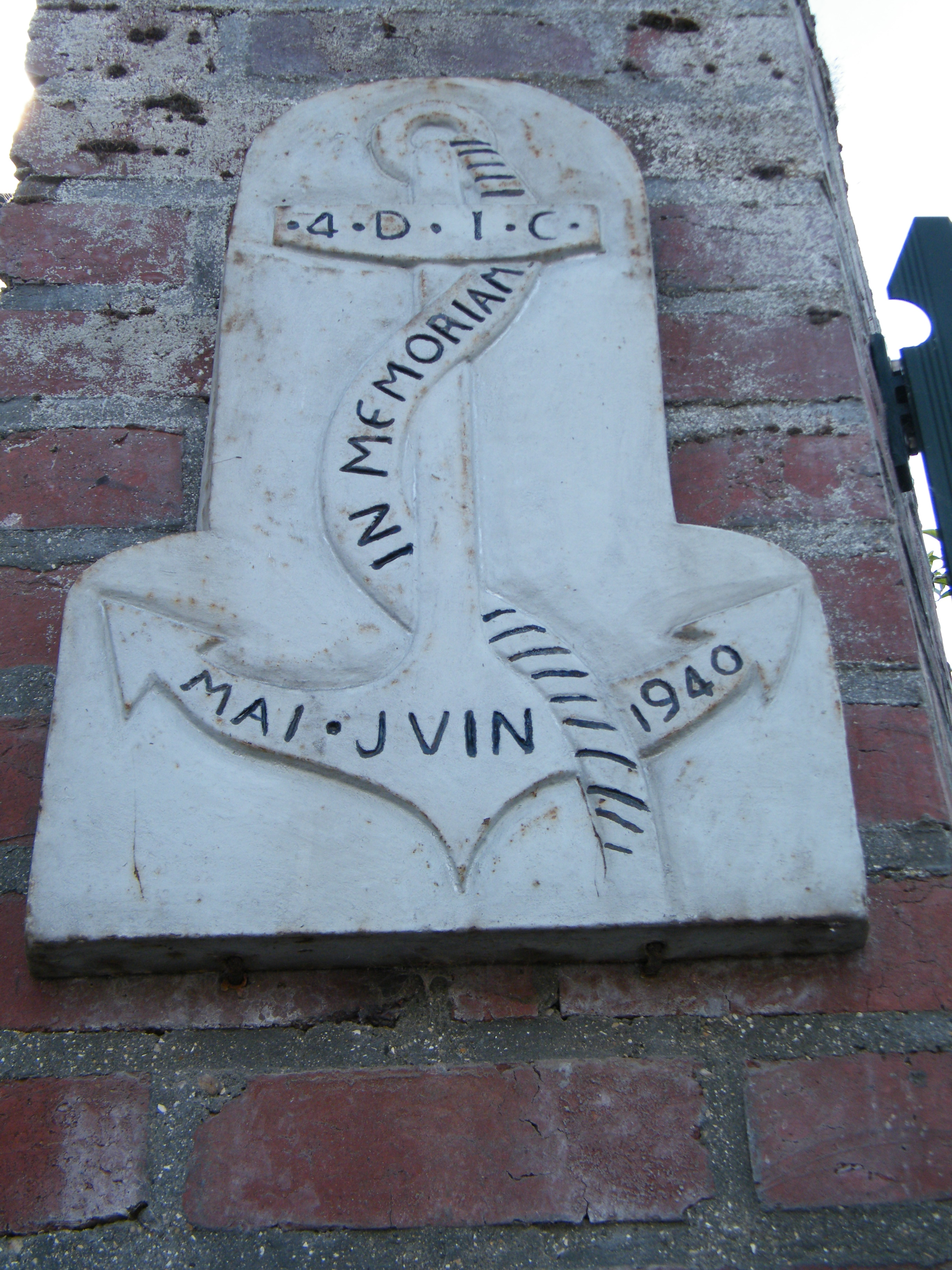 Entrée du cimetière et de l'église, côté rue principale.